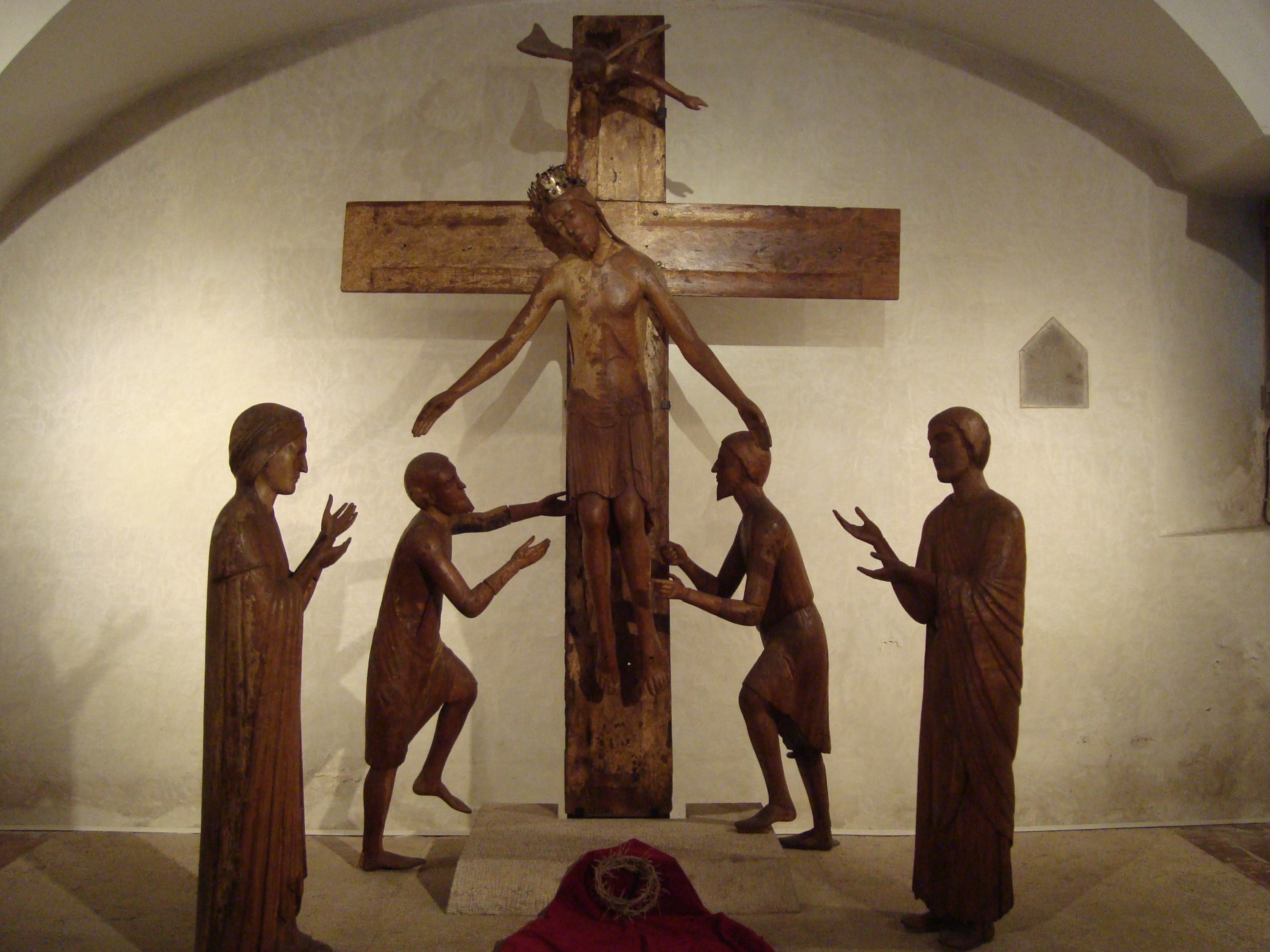 Déposition en bois du XIIIe siècle de la cathédrale de Tivoli